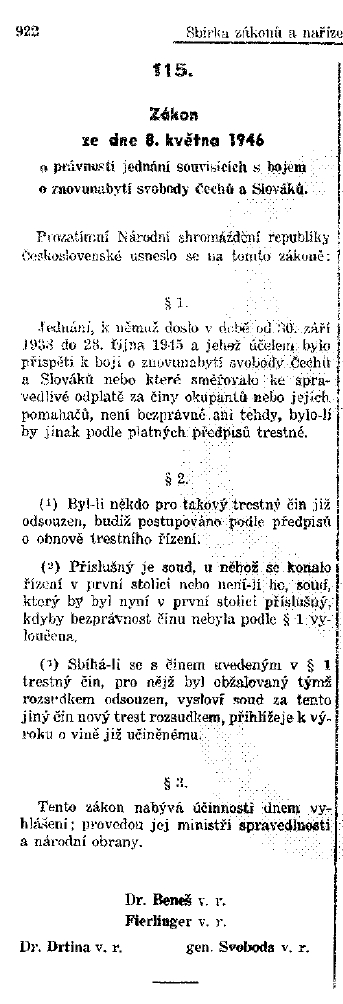 Česky: Zákon o právnosti jednání souvisících s bojem o znovunabytí svobody Čechů a Slováků, 115/1946 Sb.